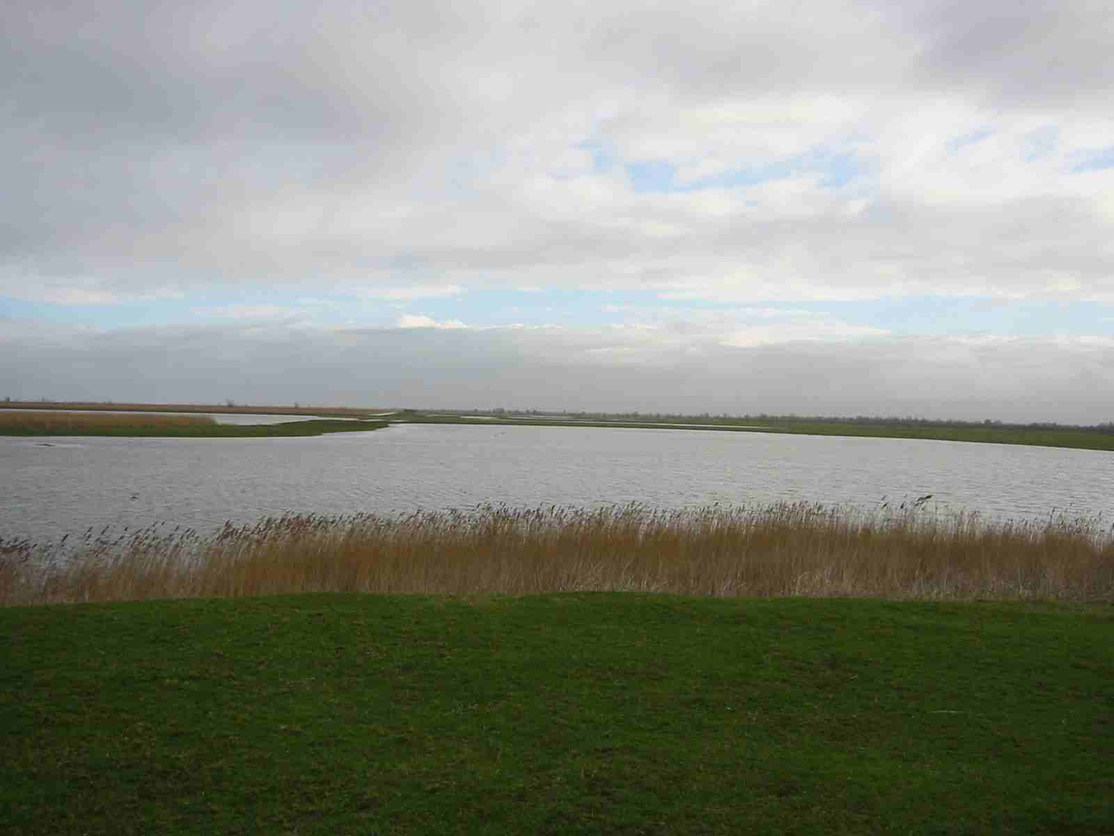 Oostvaardersplassen, a nature reserve in Netherlands